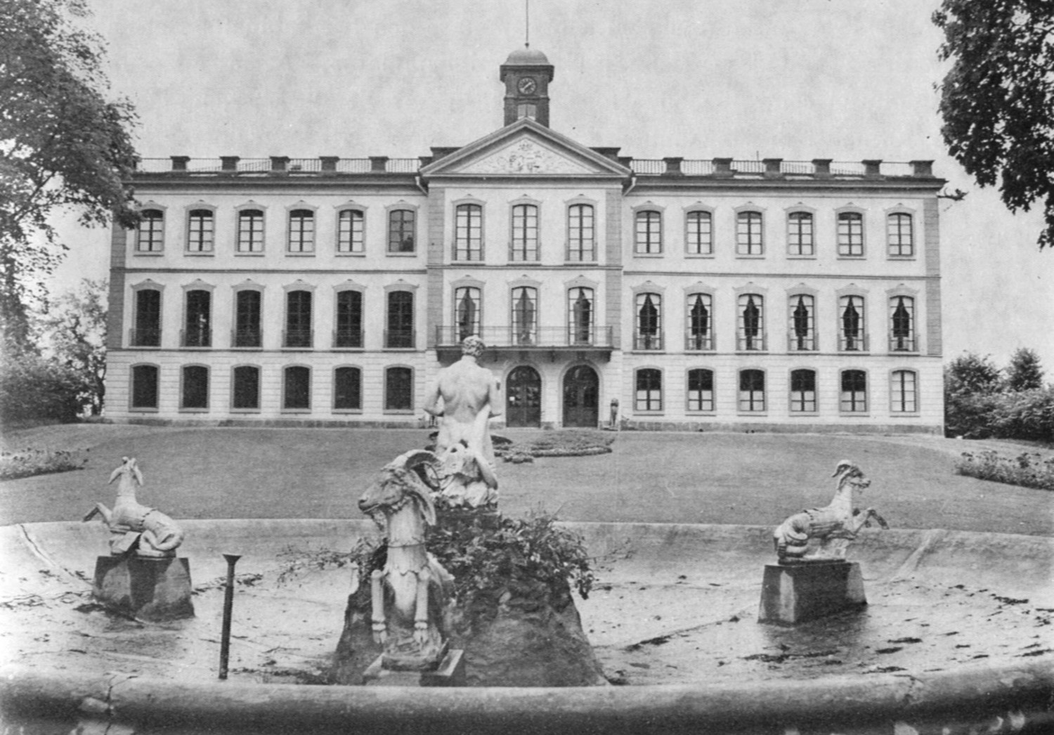 Tullgarns slott — fontän som togs bort på 1960-talet